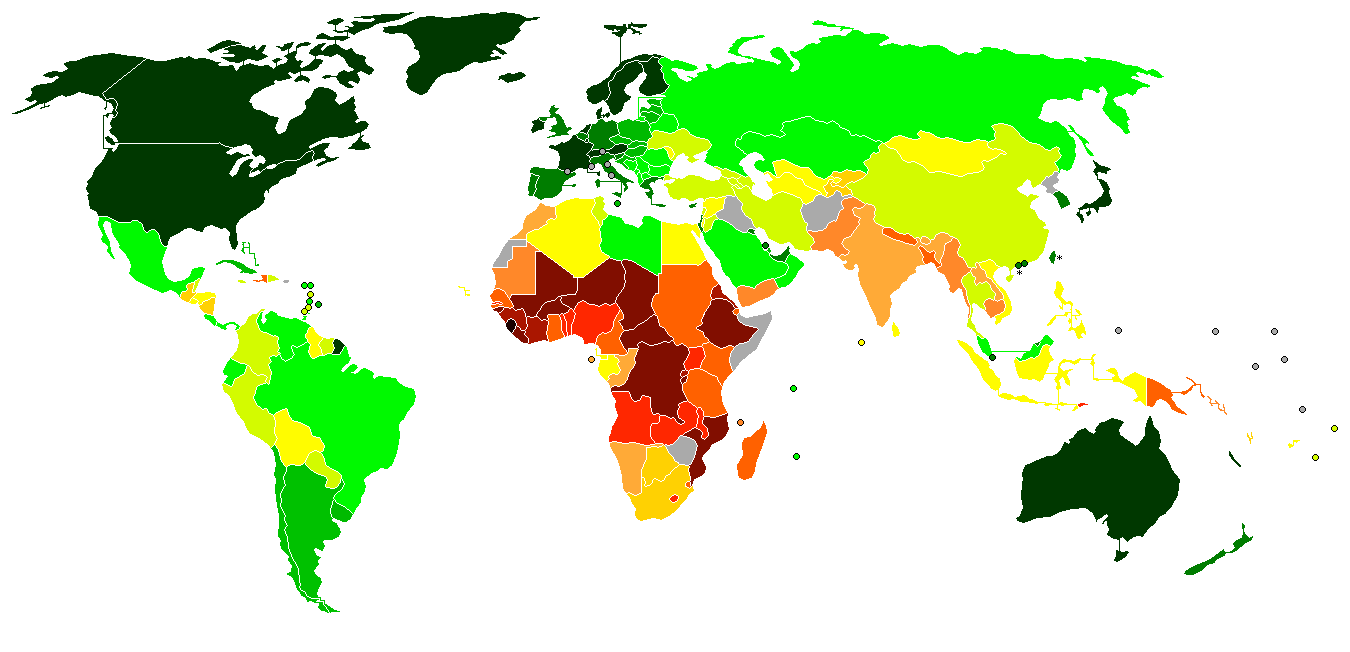 0.950–1.000 0.900–0.949 0.850–0.899 0.800–0.849 0.750–0.799 0.700–0.749 0.650–0.699 0.600–0.649 0.550–0.599 0.500–0.549 0.450–0.499 0.400–0.449 0.350–0.399 under 0.350 not available